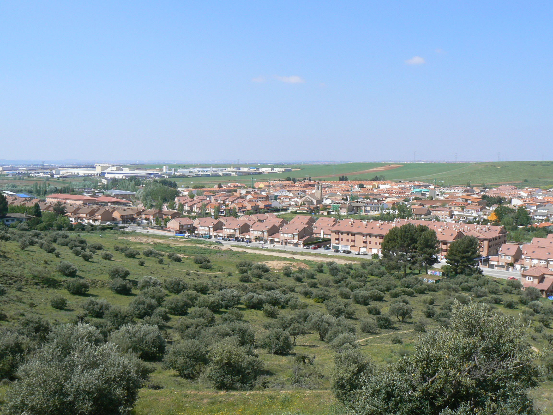 Vista panorámica de Camarma de Esteruelas, Madrid, España.